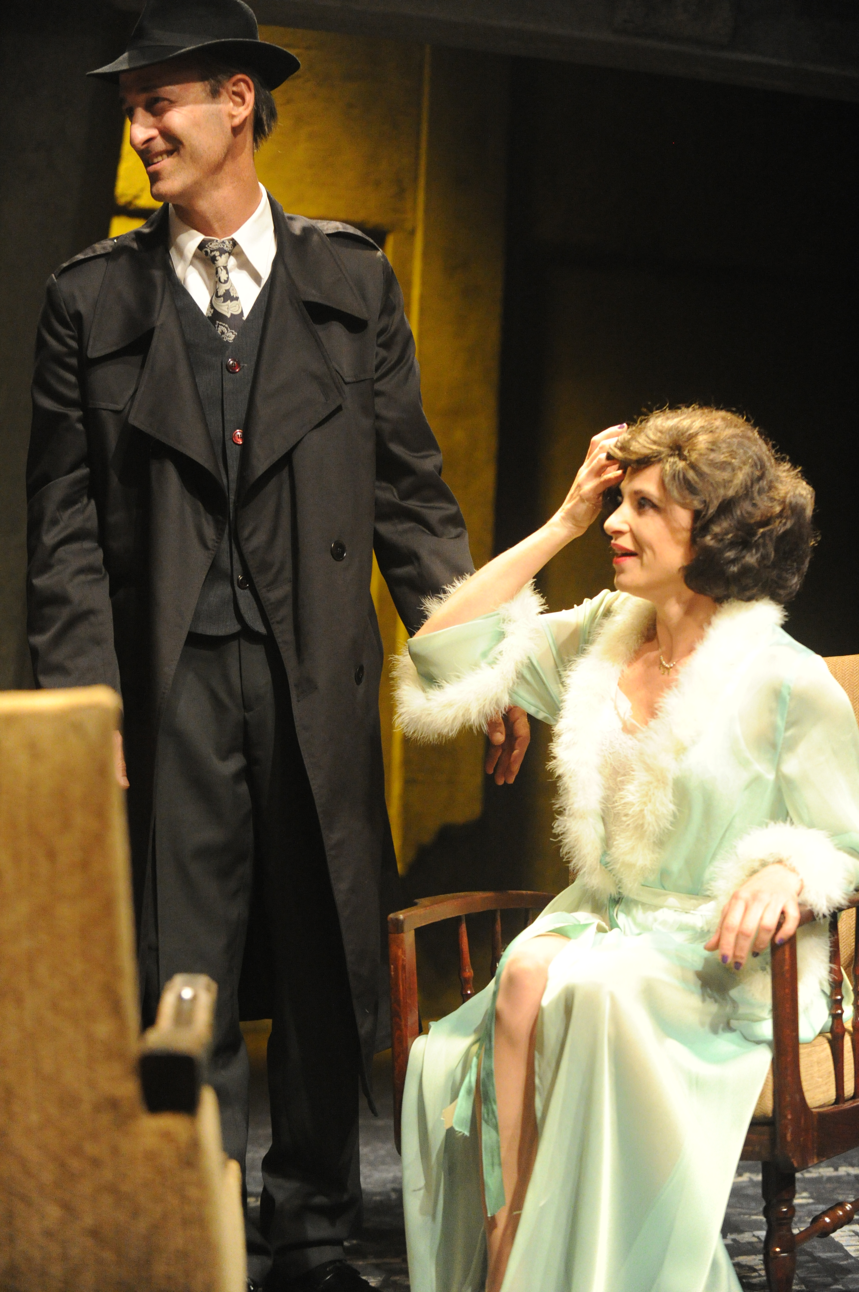 כרמית מסילתי-קפלן וניר רון, בהצגה "חוקר פרטי", מאת ובבימויו של מיקי גורביץ', תיאטרון החאן, 2011